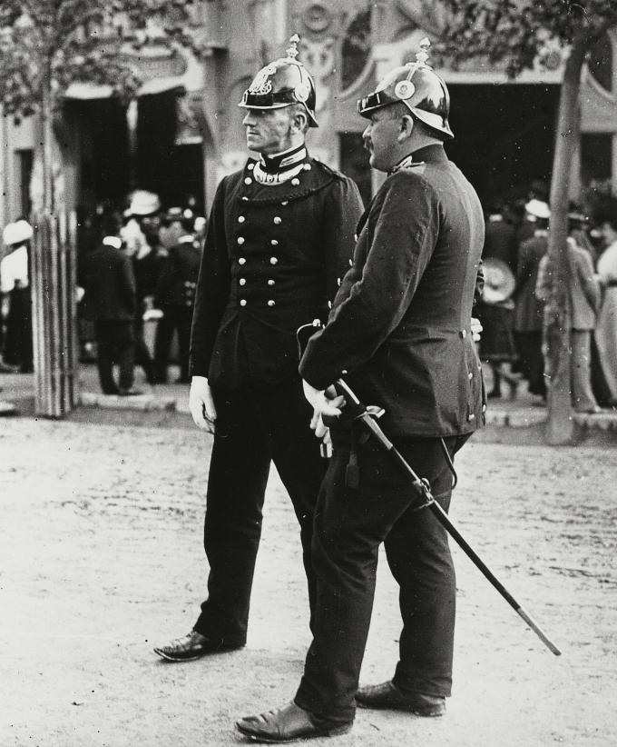 Wachleute im Wiener Prater